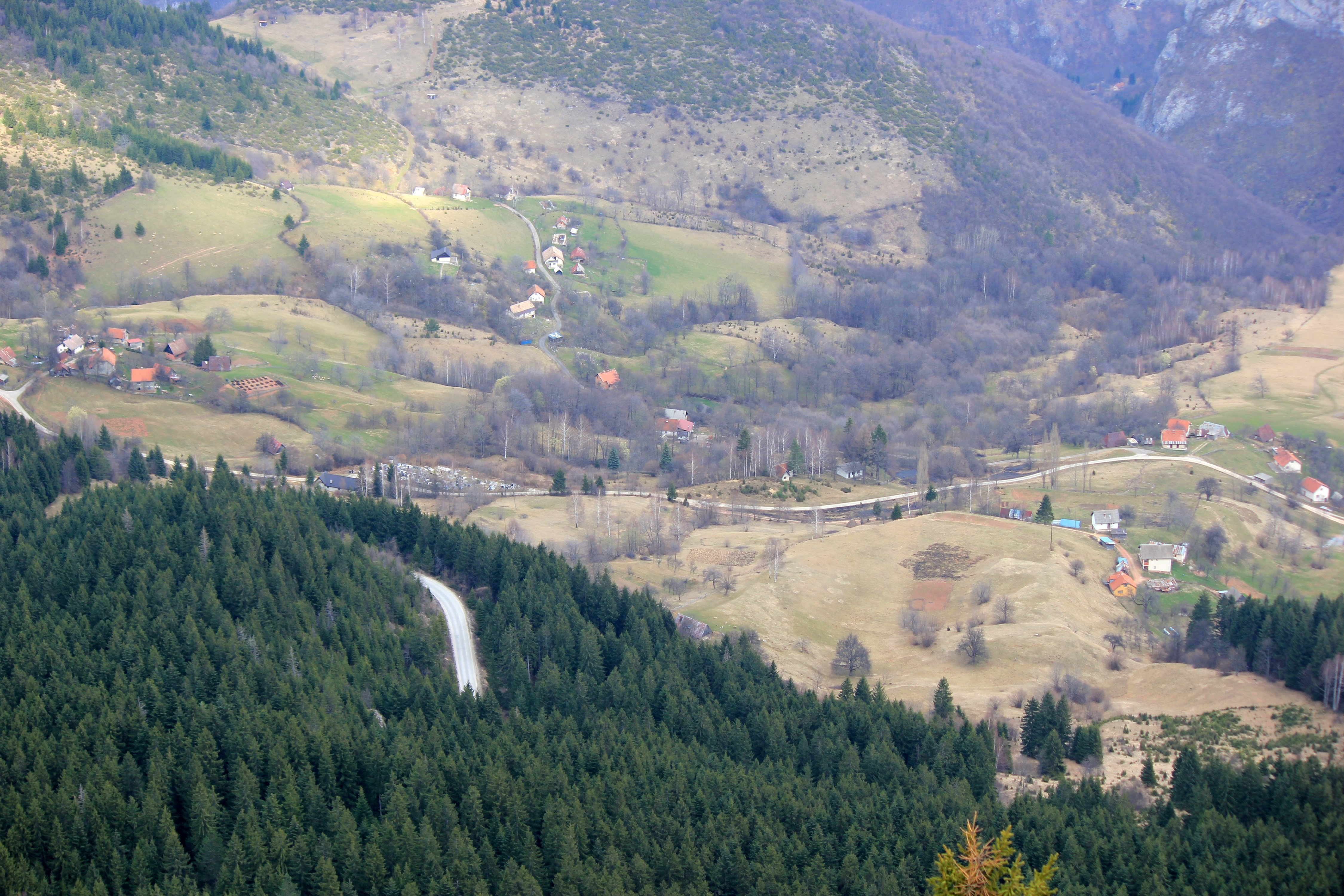 Blick vom Gipfel des Trebević auf das Dorf Dovlići